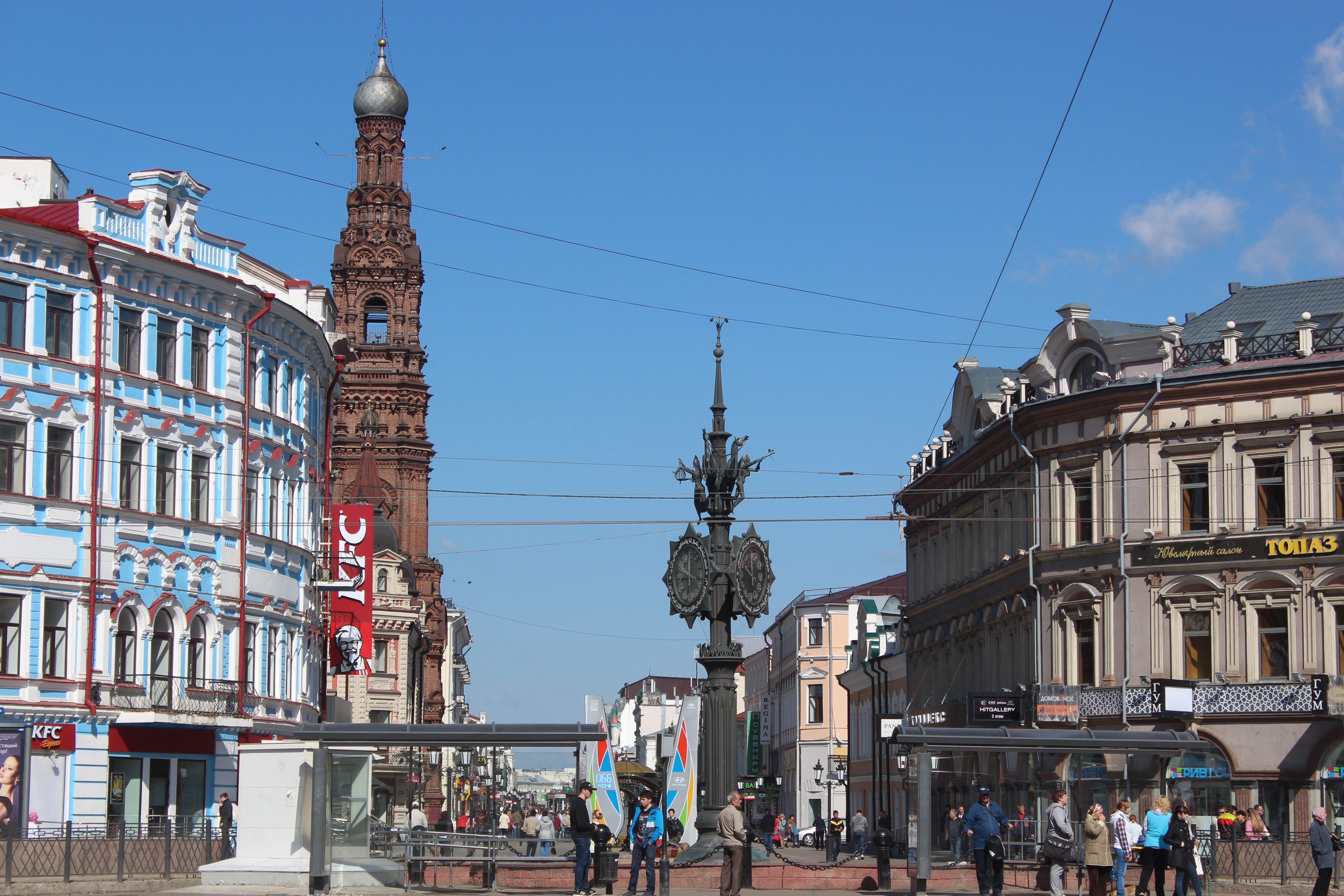 Колокольня богоявленской церкви (Республика Татарстан, Казань, баумана улица, 78)